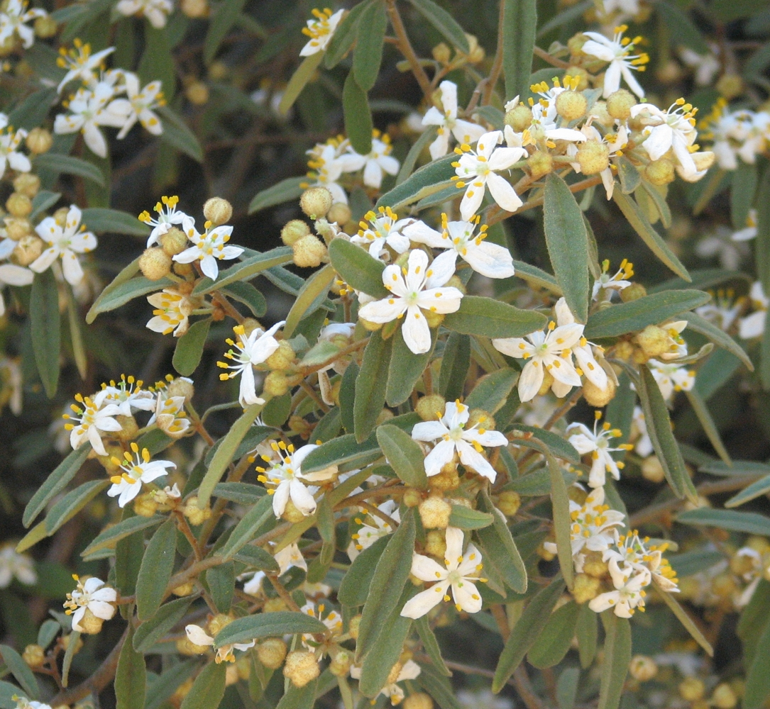 Asterolasia hexapetala, Maranoa Gardens, Balwyn, Victoria, Australia